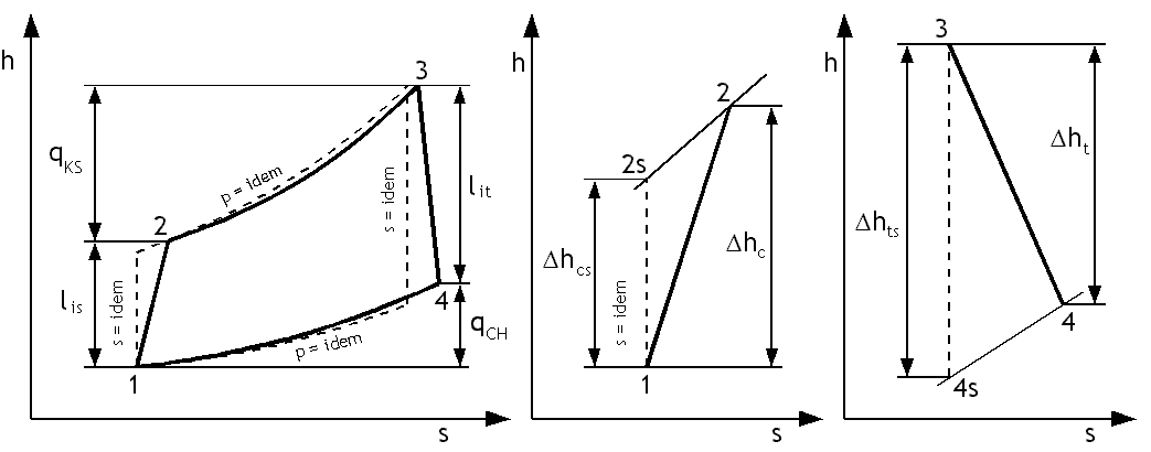 Obieg turbiny gazowej rzeczywisty na tle porównawczego, oraz porównanie przemian w sprężarce i turbinie rzeczywistych z idealnymi